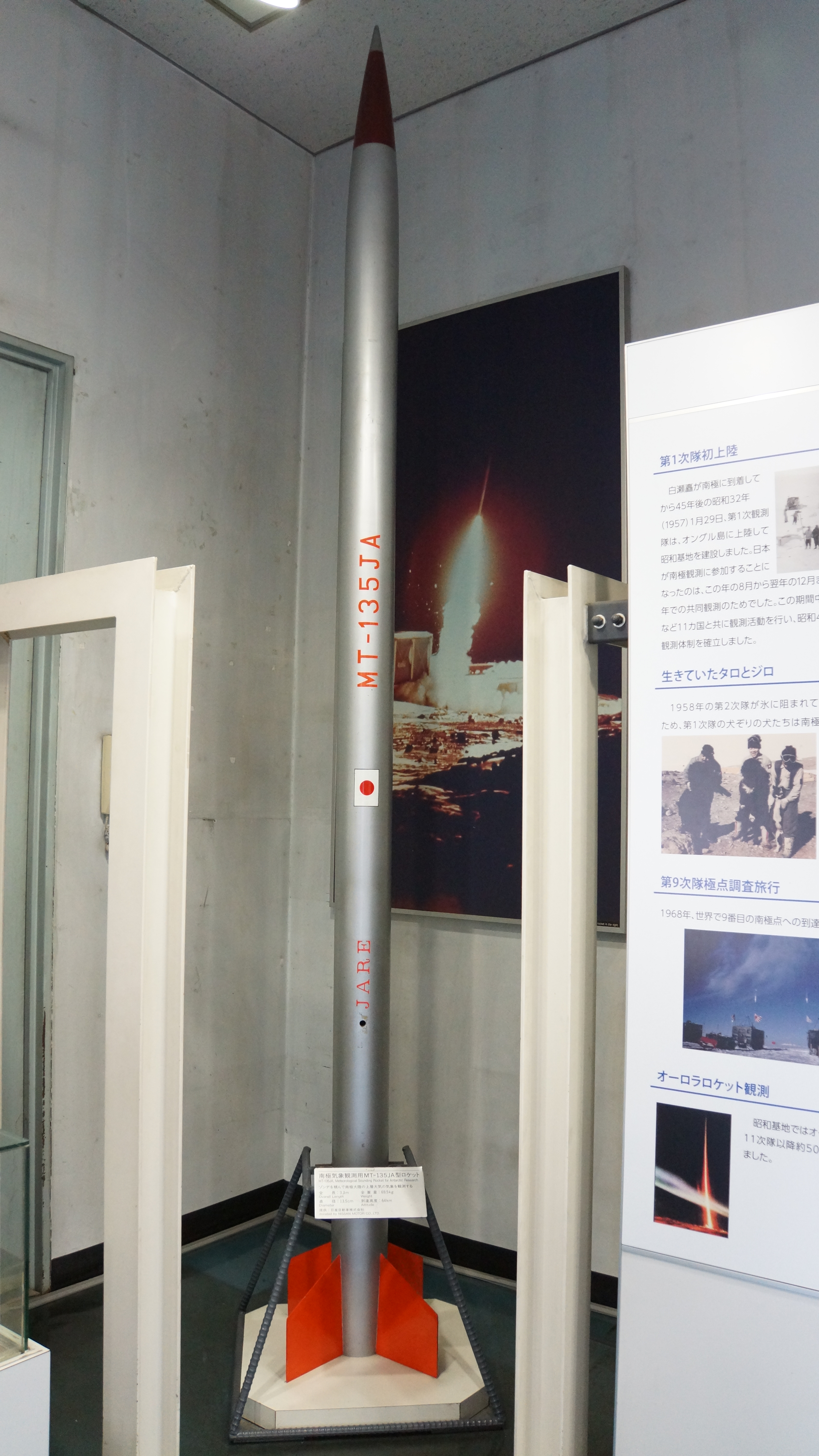 MT-135JA型南極気象観測用ロケット。 15年5月30日 砕氷艦ふじ格納庫内の展示室にて。